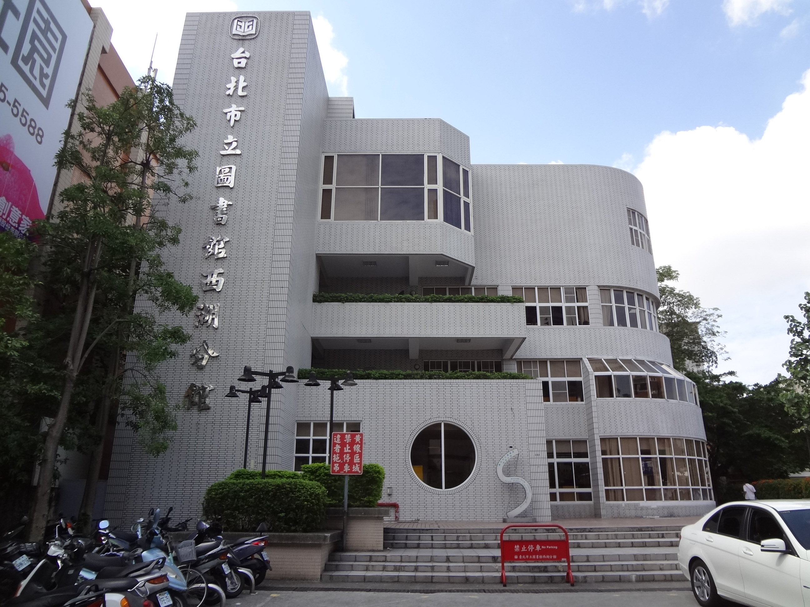 臺北市立圖書館西湖分館。